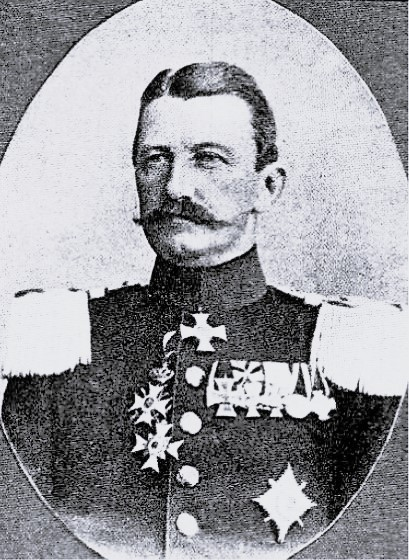 Hermann Friedrich Wilhelm Adolf von Brauchitsch (* 23. Mai 1840 in Berlin; † 5. Juni 1916 in Leubus) war ein deutscher Offizier, zuletzt Generalleutnant.